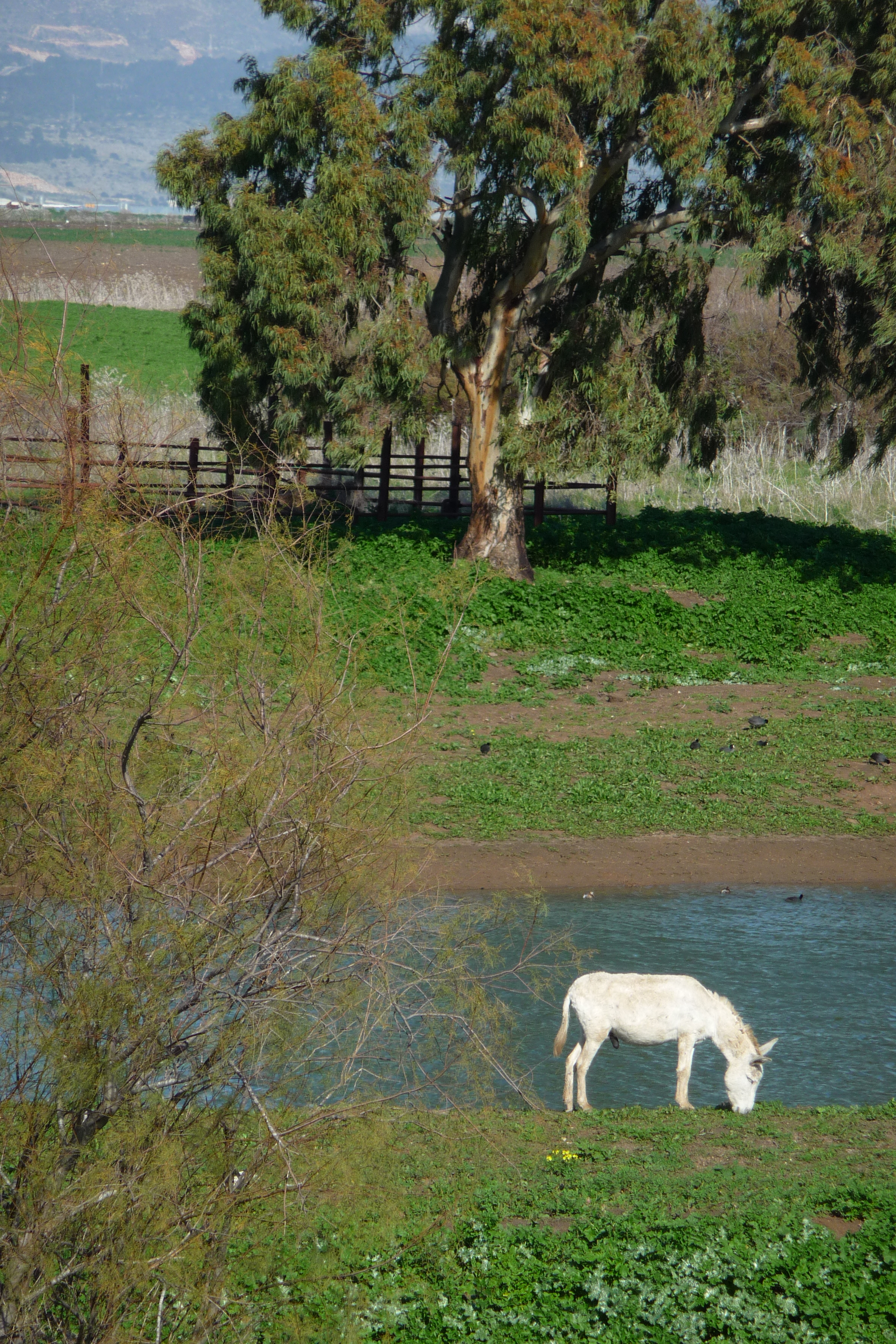 שמורת טבע בעמק זבולון, מזרחית לקריית ביאליק. השמורה כוללת הן את המעיינות והביצות המהווים את מקורו של נחל נעמן והן את האתר הארכאולוגי תל אפק. השמורה הוכרזה ב-1979 והיא משתרעת על פני 660 דונם. ב-1996 הוכרה השמורה כ"אתר רמסר" בהתאם לאמנת רמסר לשימור ולפיתוח בר-קיימא של בתי גידול לחים.